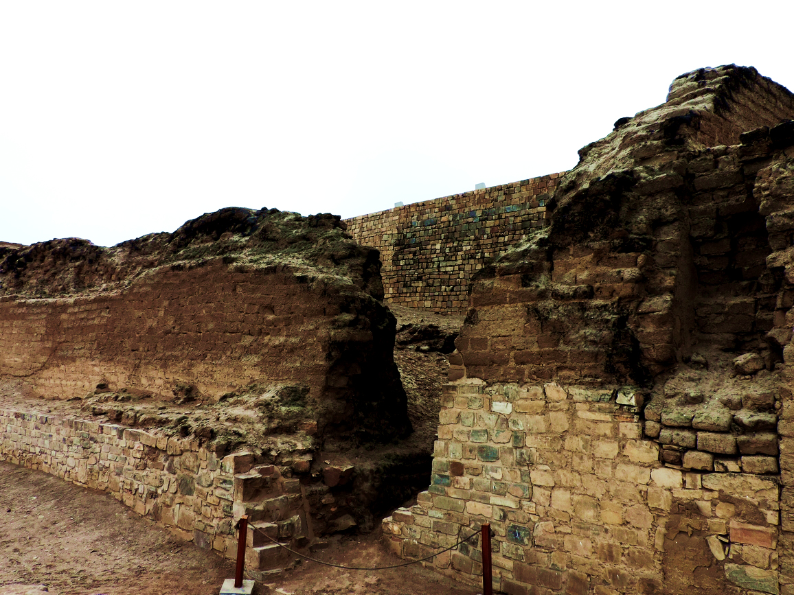 Pachacamac (Peru)